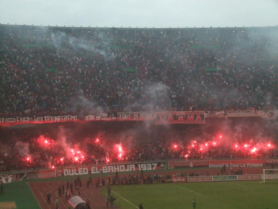 Public du club algérois USMA durant la finale de la coupe arabe au stade du 5 juillet à Alger, le 14 mai 2013.